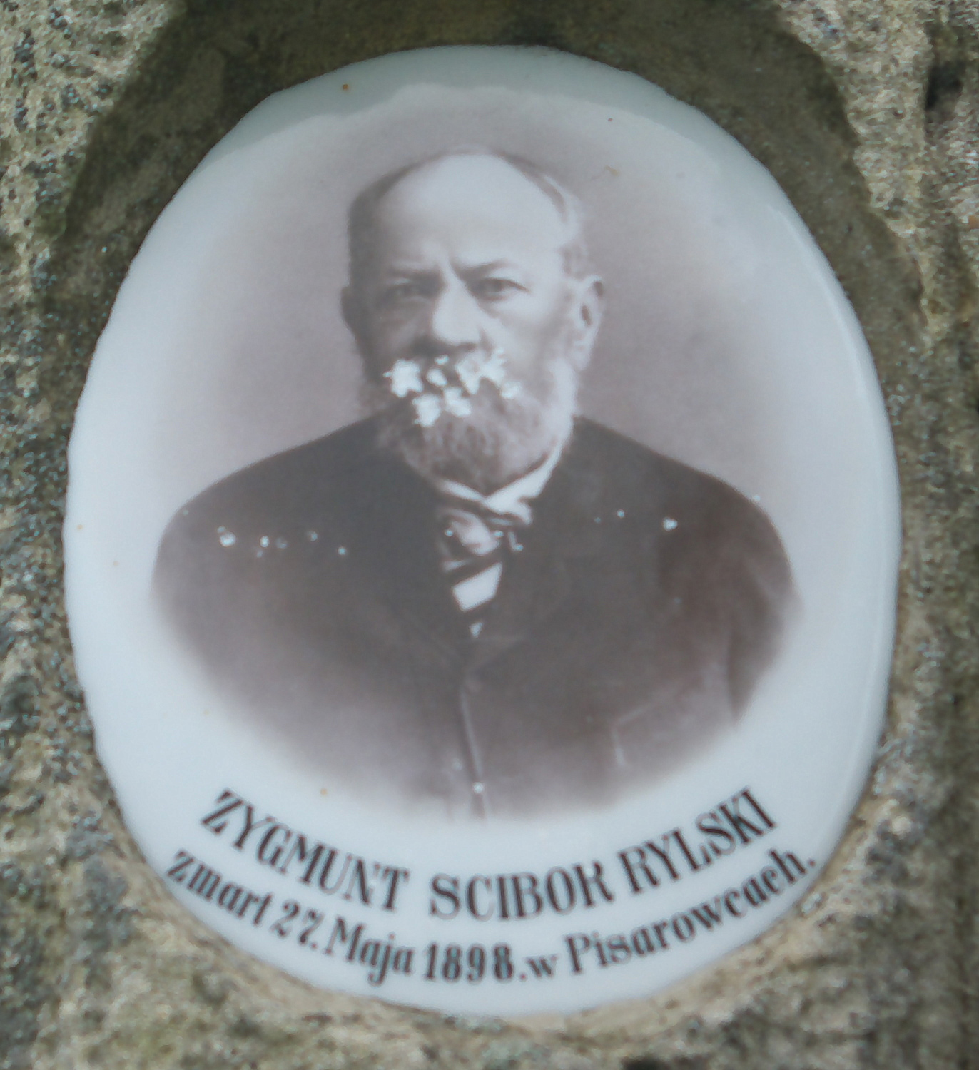 Nagrobek Zygmunta Ścibor-Rylskiego w Dudyńcach.